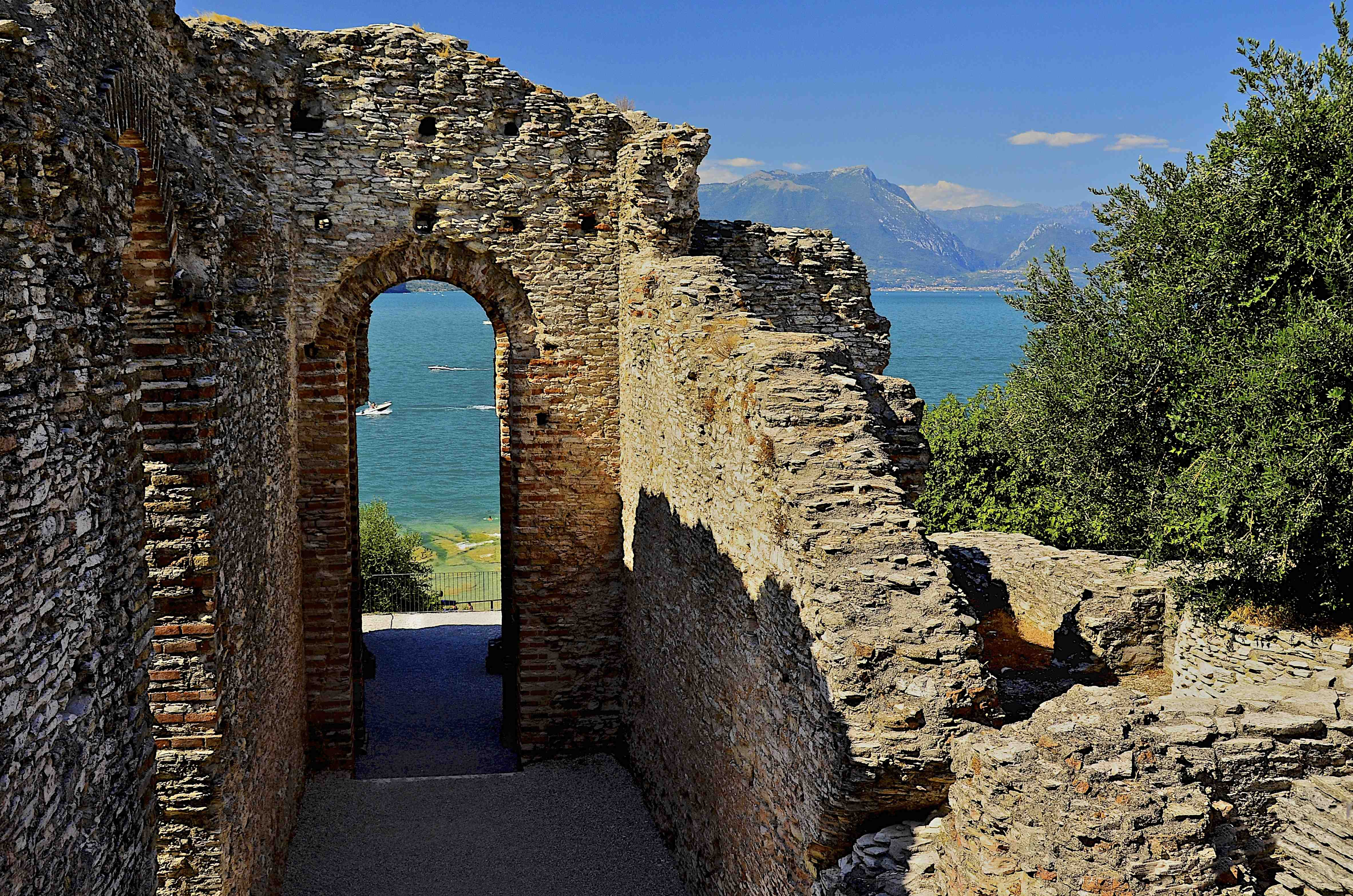 Area archeologica Grotte di Catullo This is a photo of a monument which is part of cultural heritage of Italy.